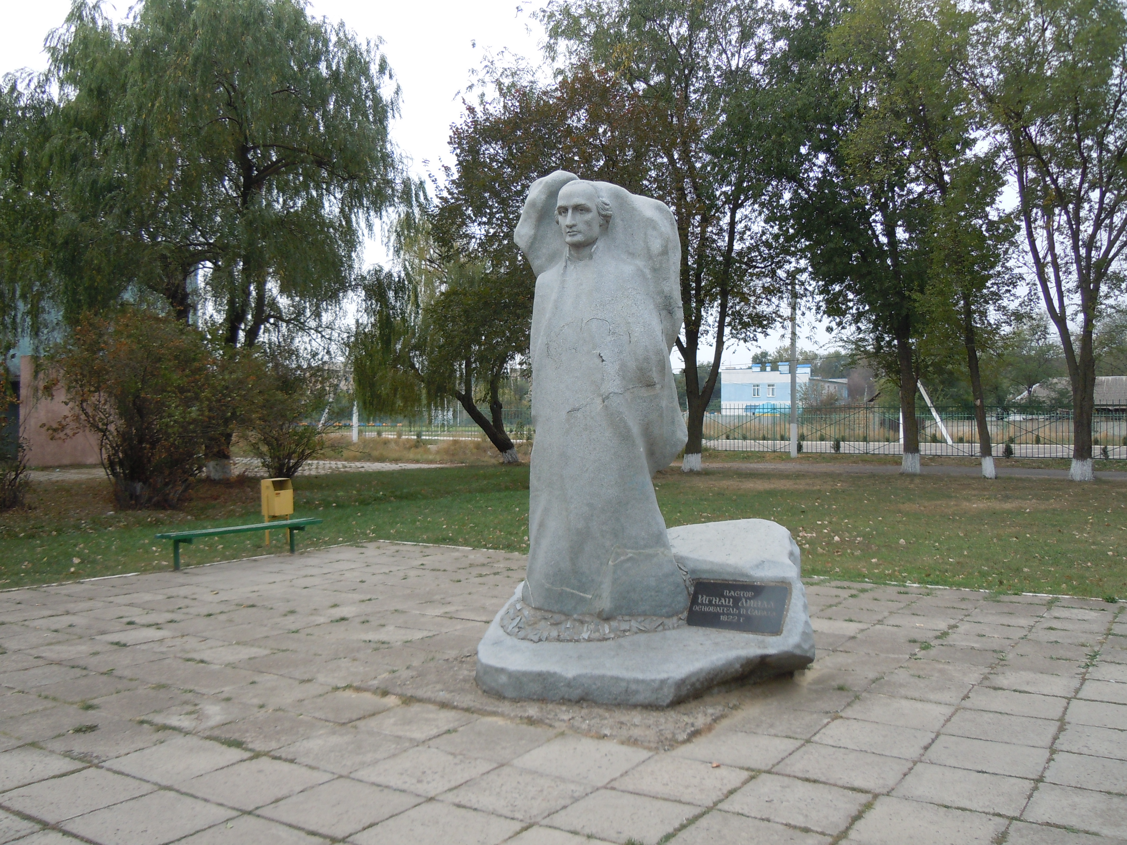 Монумент Іґнацу Ліндлю в смт Сарата, Одеська область